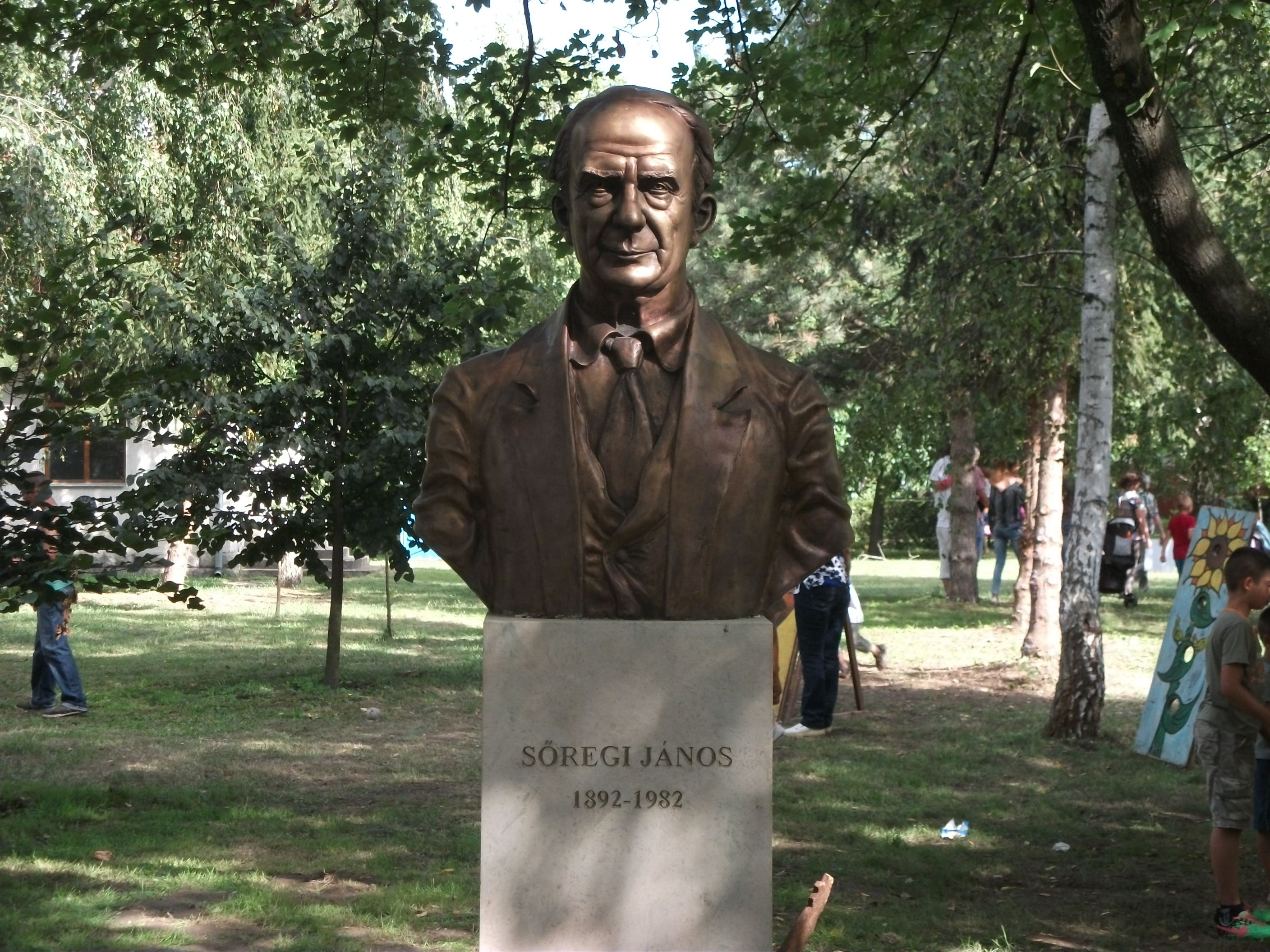 Sőregi János (1892 - 1982) régész, muzeológus, múzeumigazgató bronz mellszobra Cigándon, a Hősök terén. Czigándi Varga Sándor alkotása - 2013.